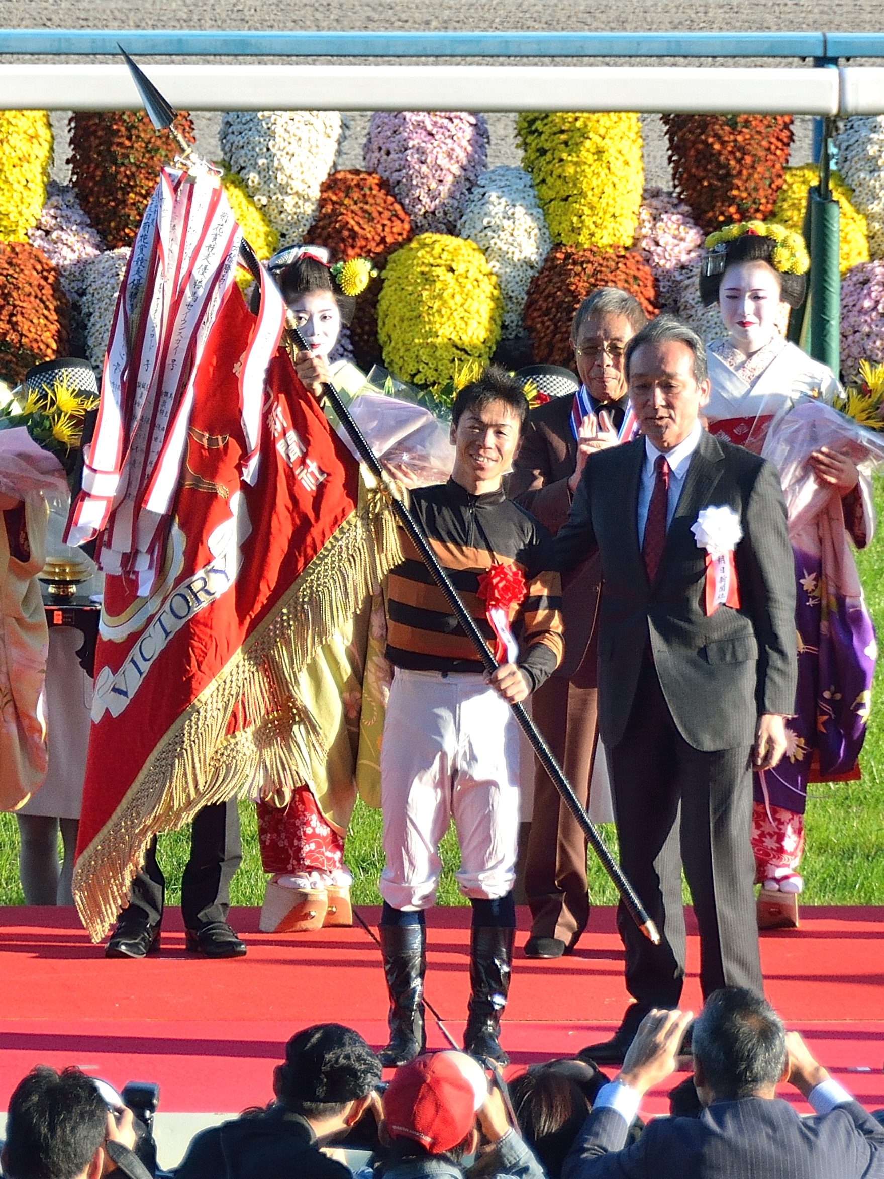 2015年10月25日に京都競馬場で行われた「第76回菊花賞」の表彰式で、優勝旗が授与された勝利騎手の北村宏司を、観客席から撮影したもの。